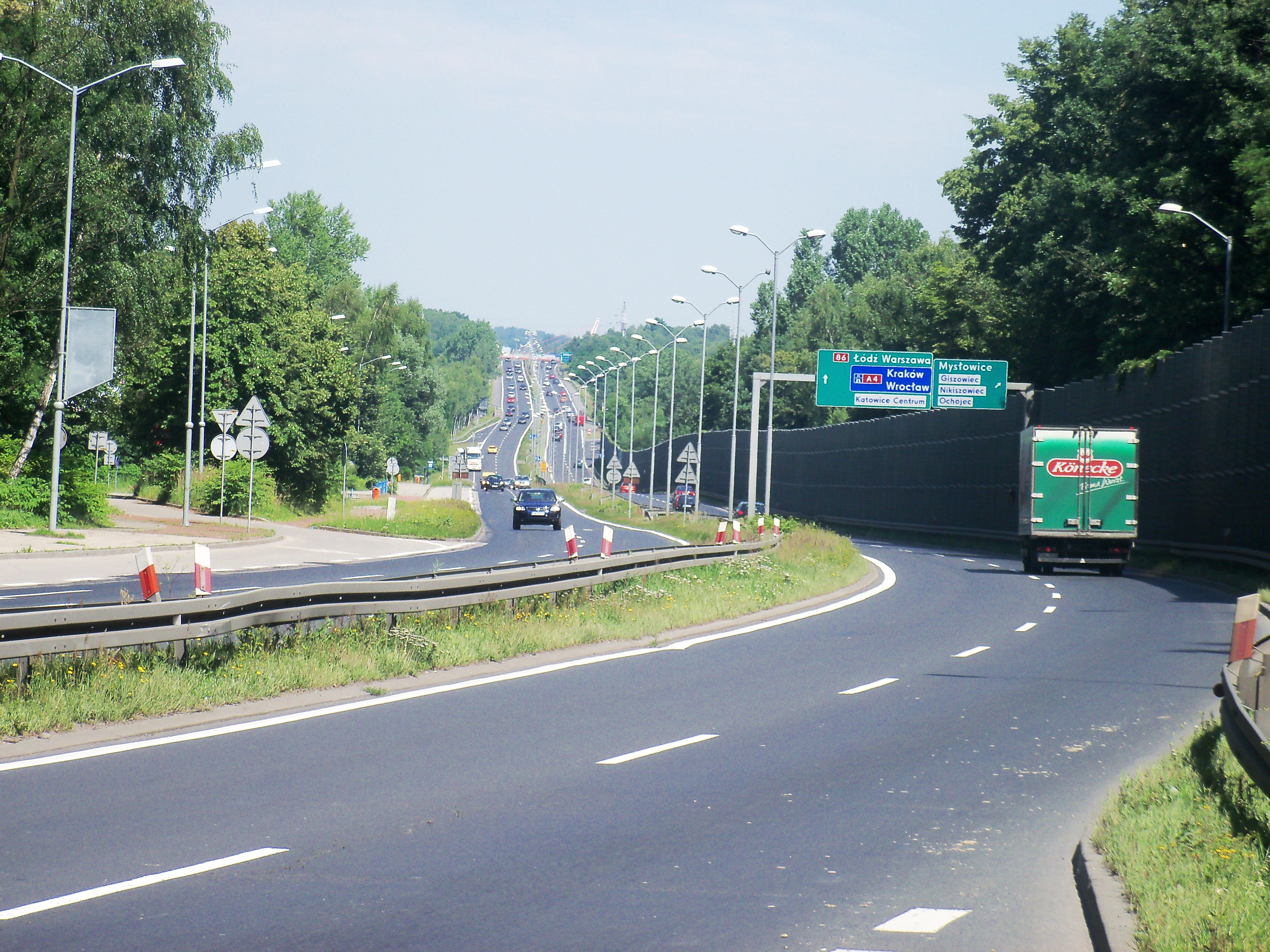 Katowice Giszowiec - ulica Pszczyńska